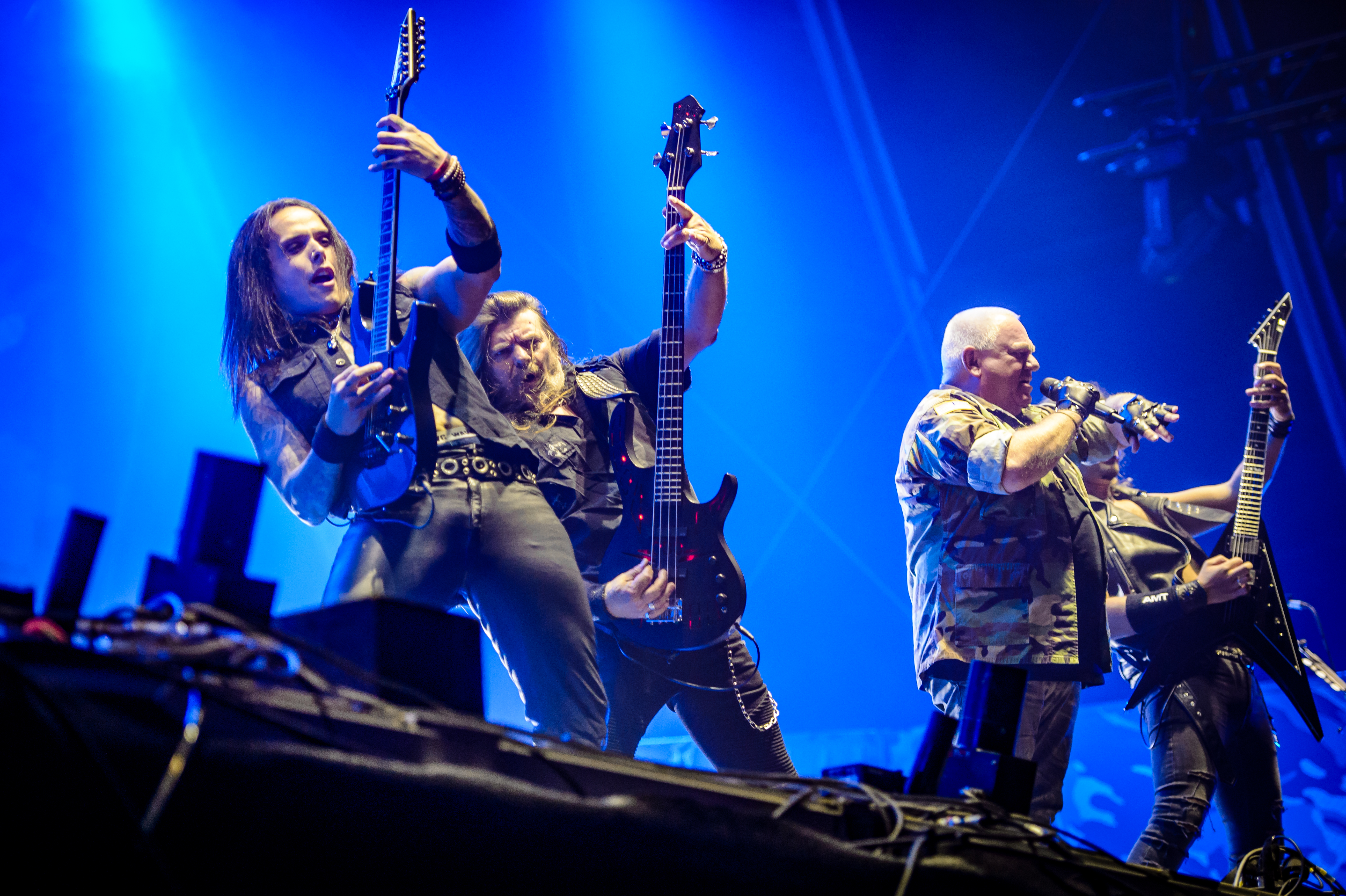 'RockHarz Open Air 2017; Ballenstedt': 'Dirkschneider'